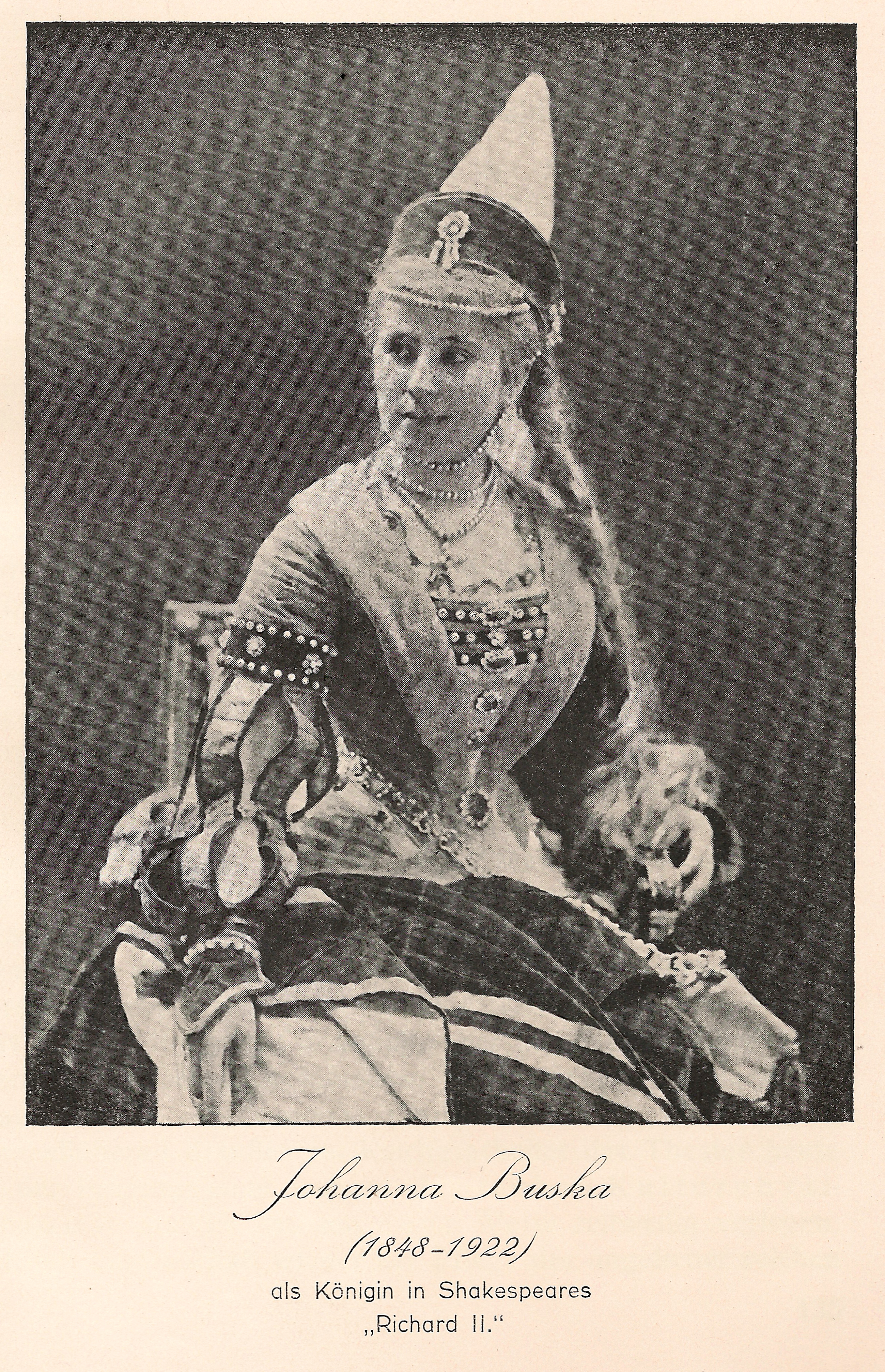 Johanna Buska actress